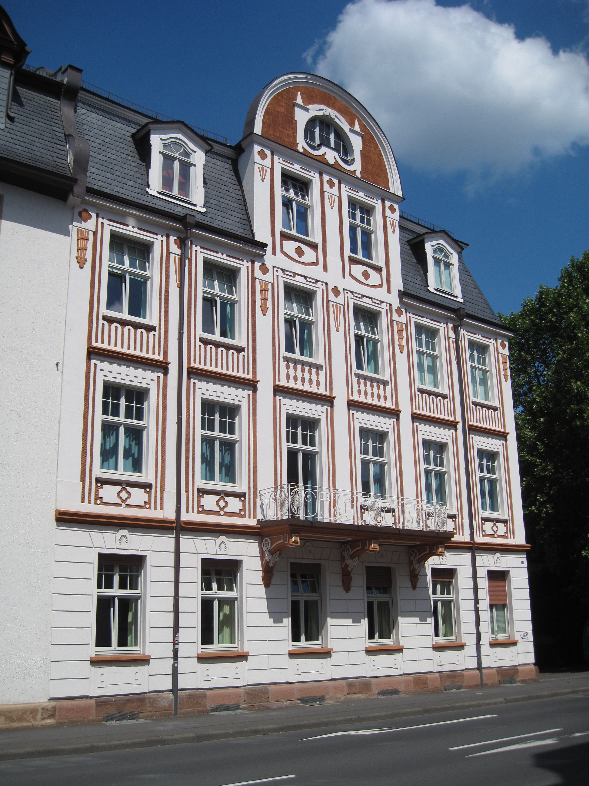 Gebäude Deutschhausstraße 24 in Marburg.